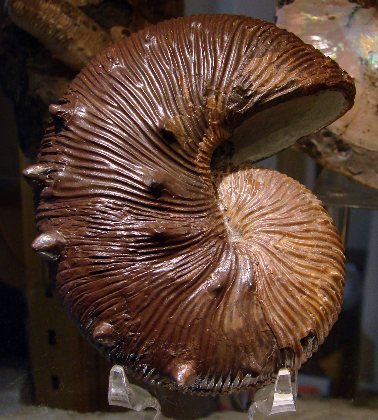 Scaphite, Crétacé supérieur. Provenance:Pierre Shale, Dakota du Sud.